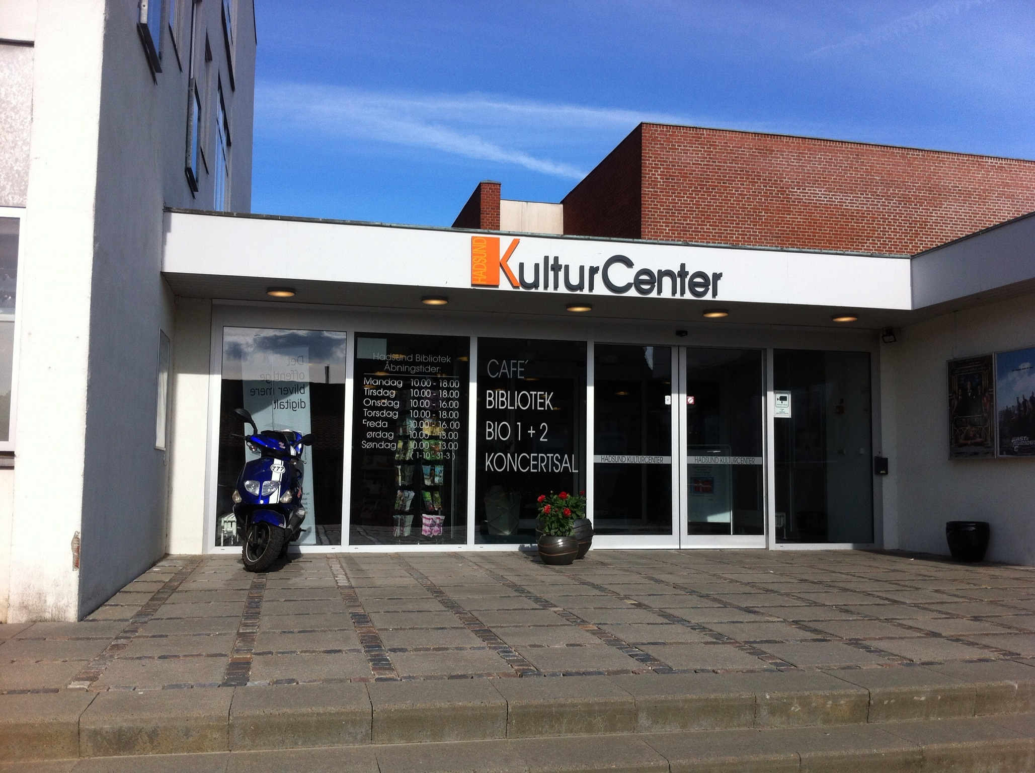 Hadsund KulturCenters indgang